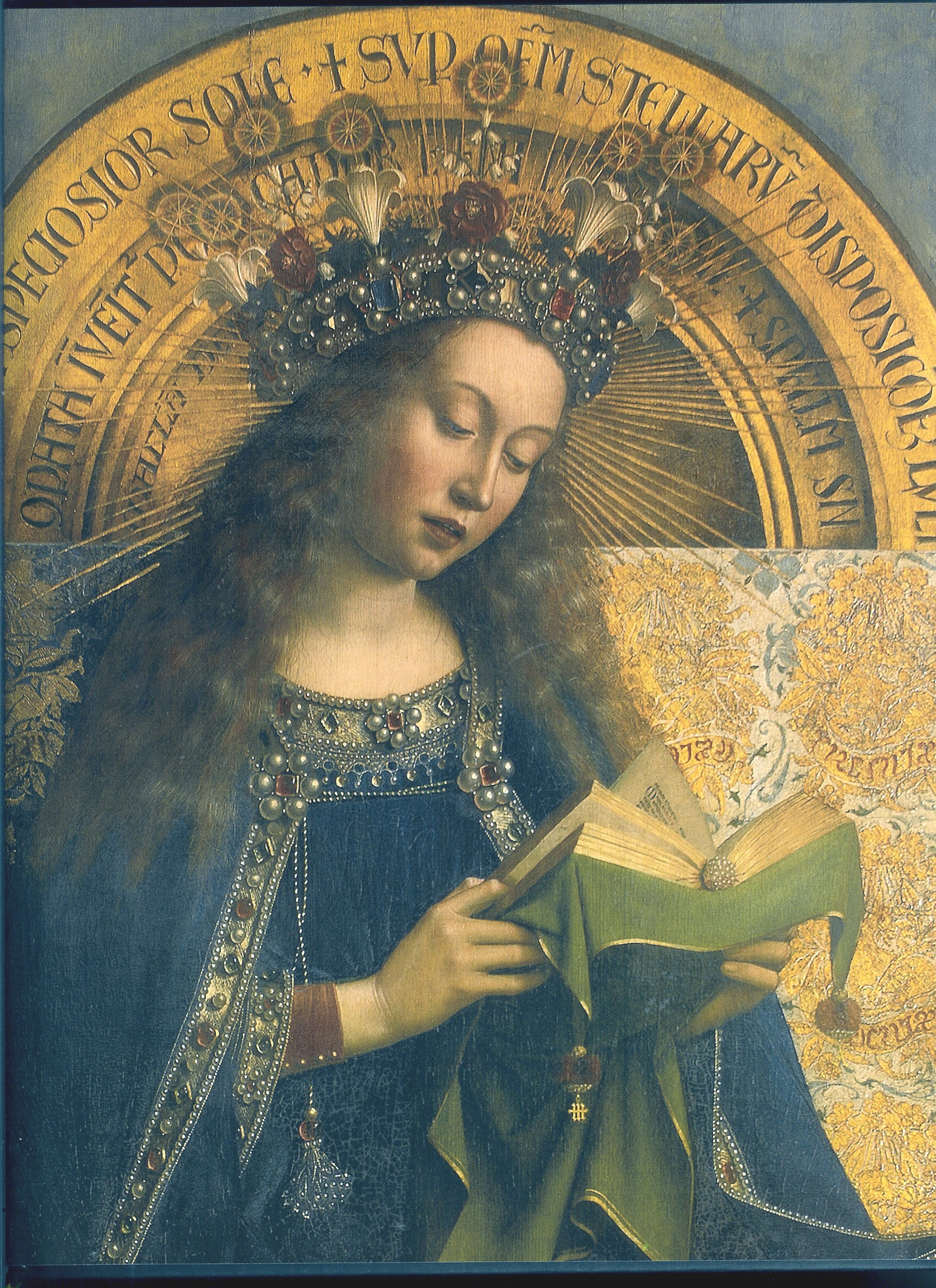 detail: Mary